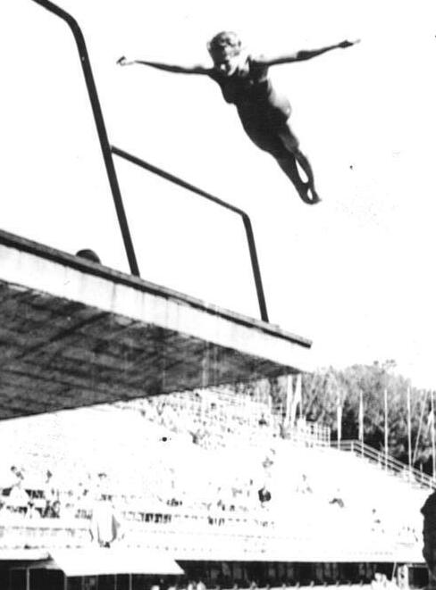 Zentralbild-AP Sd-Fr AV. 3317 27.8.1960 XVII. Olympische Sommerspiele 1960 in Rom. Ingrid Krämer erkämpfte sich Goldmedaille. Bei den XVII. Olympischen Sommerspielen in Rom erkämpfte sich am 18.8.1960 im Kunstspringen der Damen die 17jährige DDR-Sportlerin Ingrid Krämer überlegen die Goldmedaille vor Pope (USA) und Ferris (Großbritannien). UBz: Ingrid Krämer bei einem Sprung im Vorkampf.